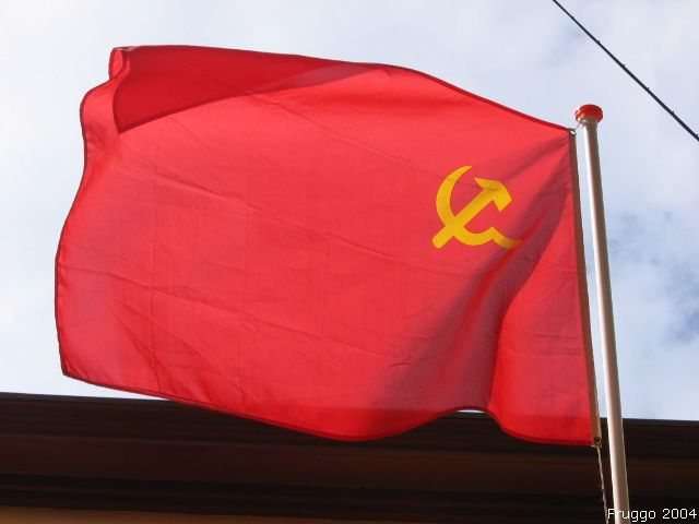 Foto door Fruggo, 2004, licentie CC-BY.